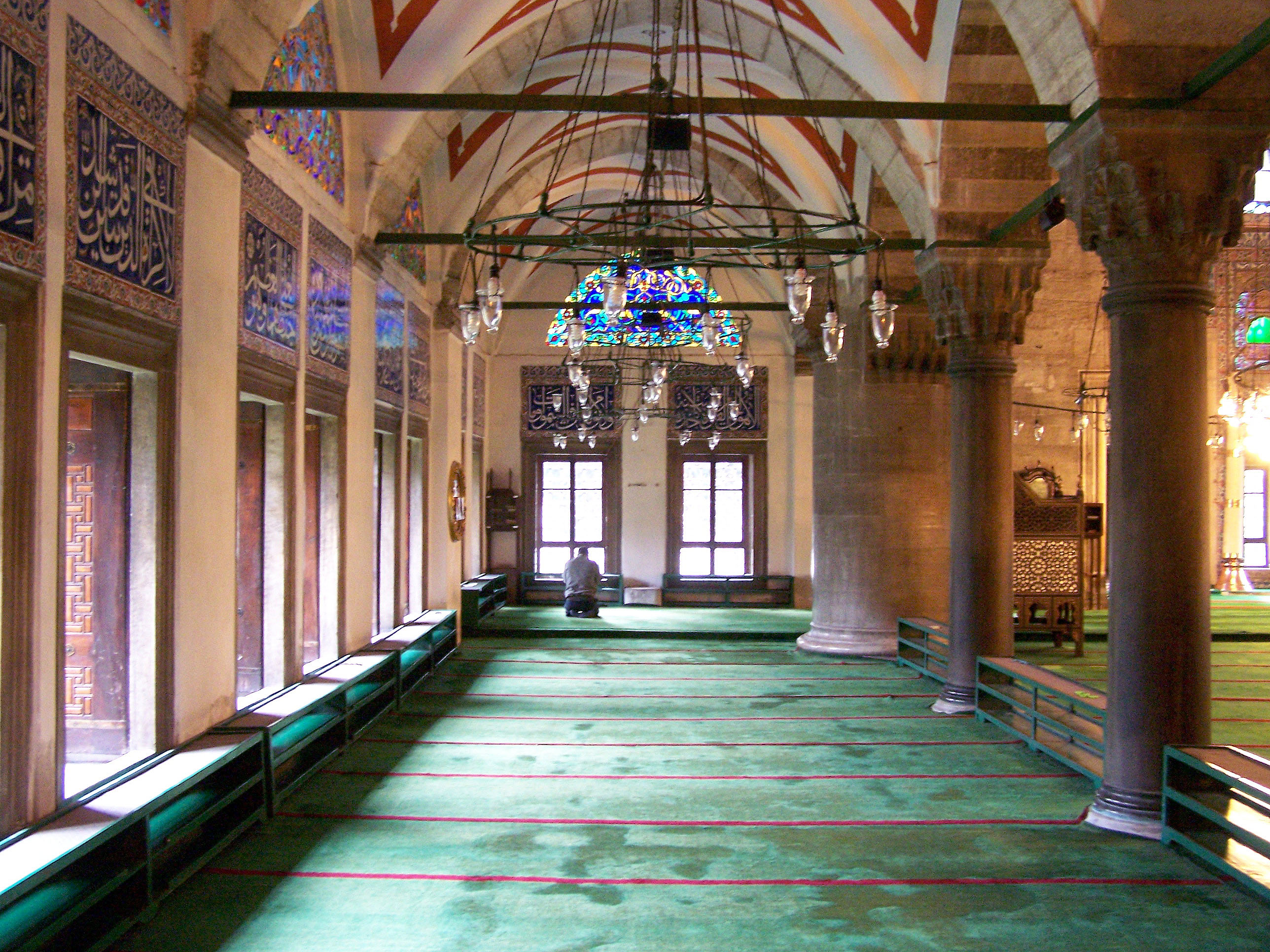 Interior of Kılıç Ali Paşa Camii in Tophane